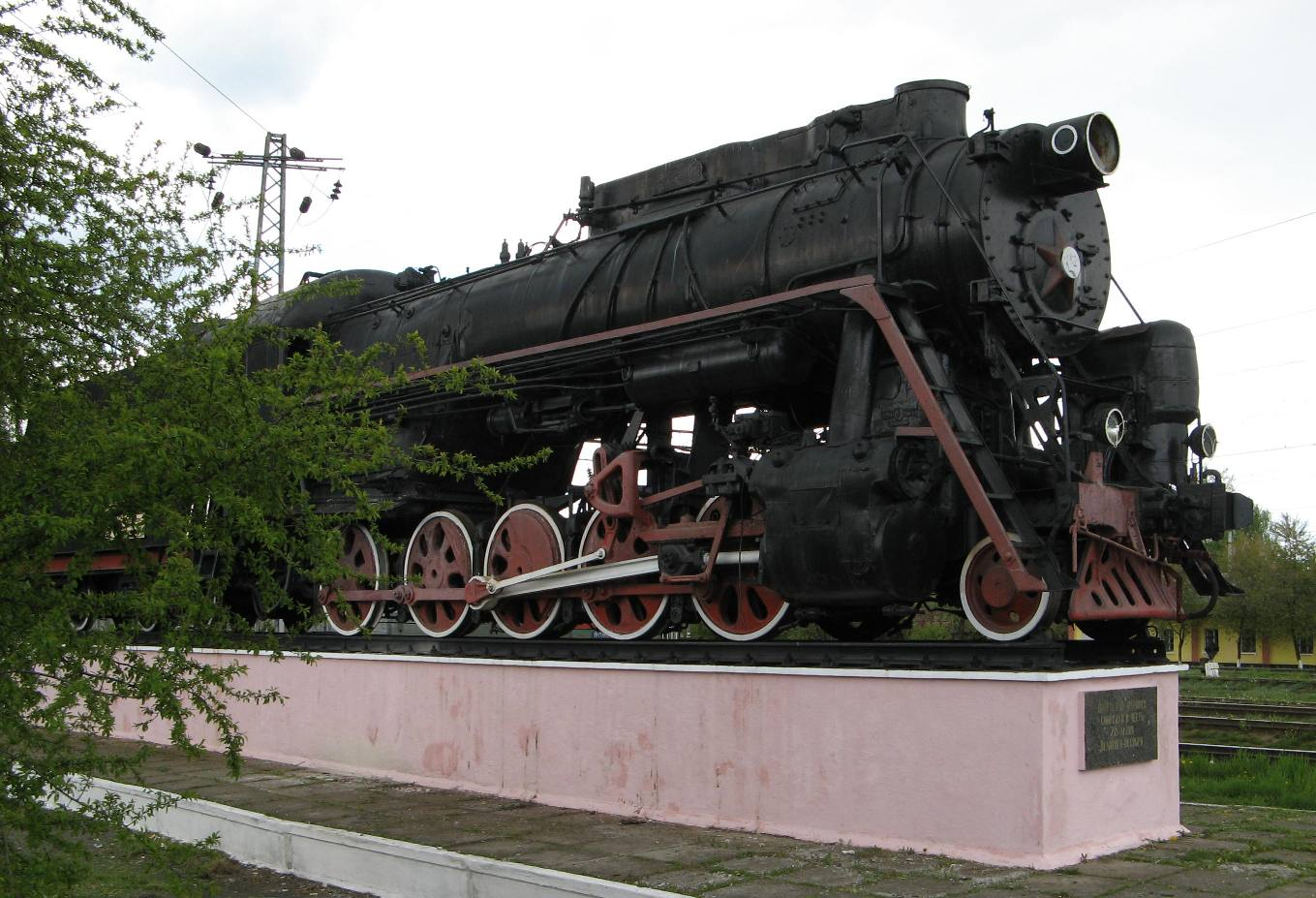 Паровоз Л-2309 (Лебедянского) - визитная карточка Казатина